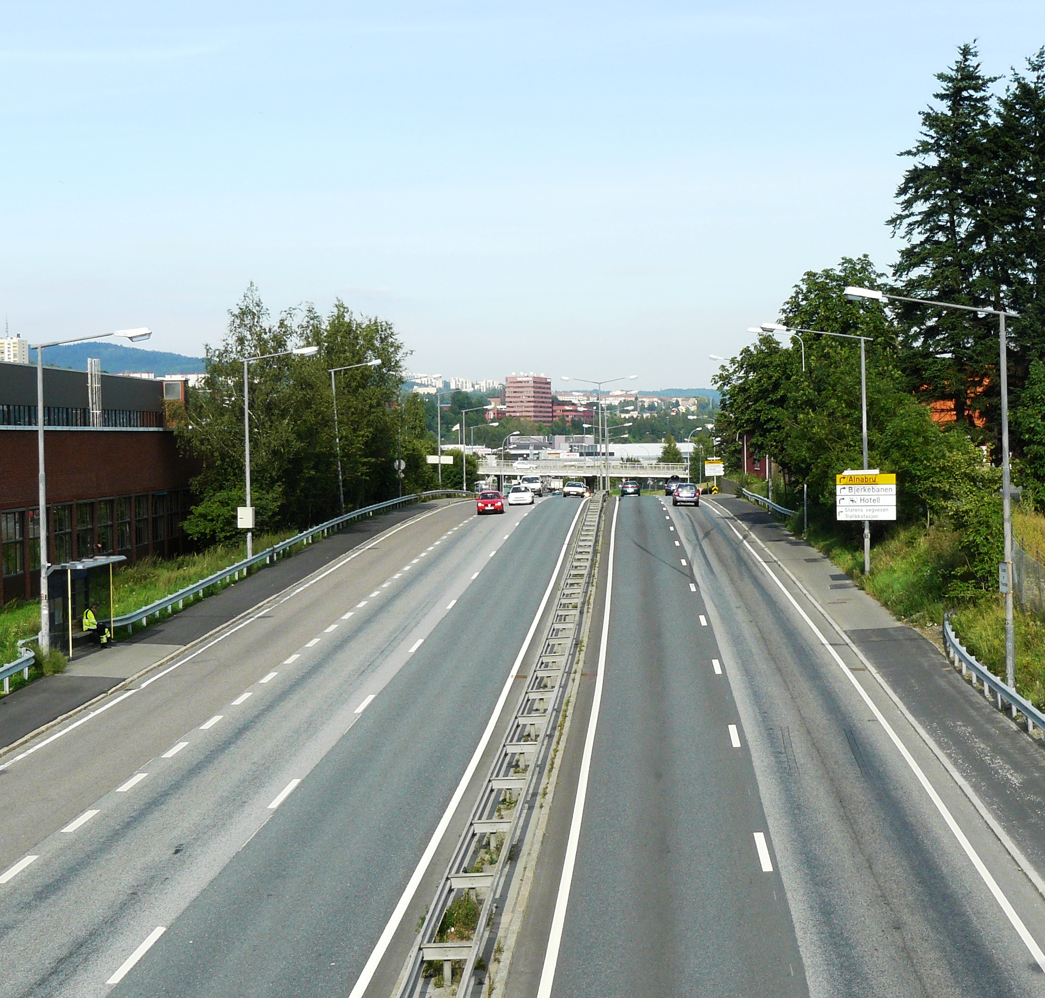 Østre Aker road (Rv 163), Oslo. Fra Risløkka mot Brobekkveien